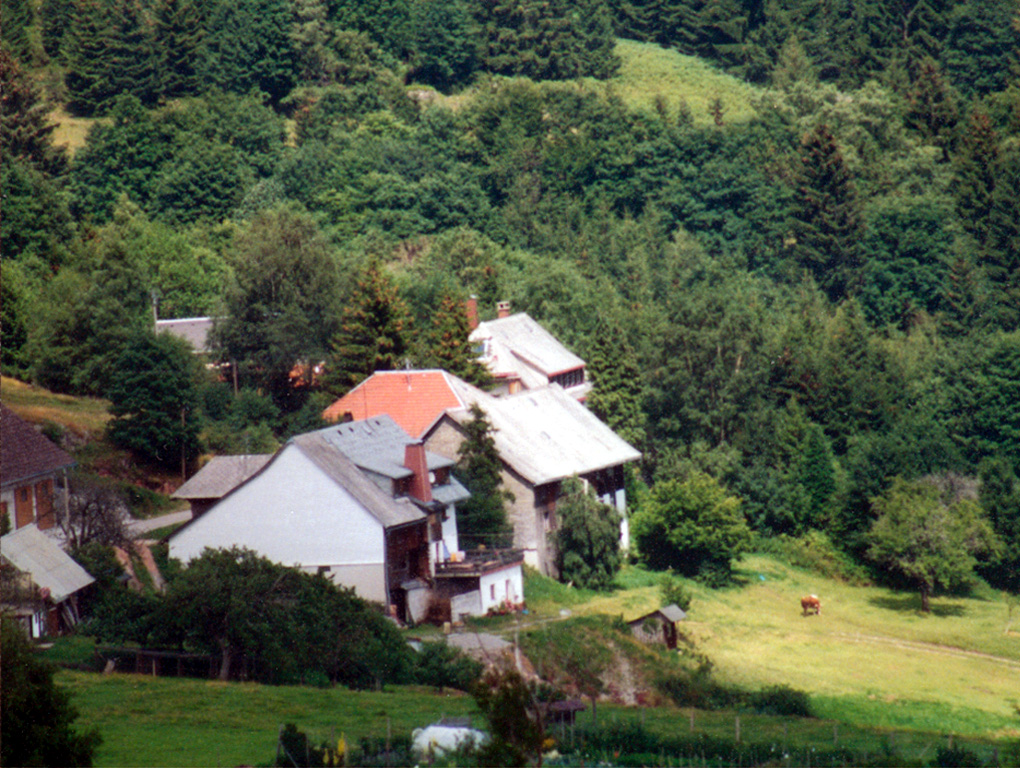 Description: Schwand Author: Stefan Stegemann Date: 1999 License